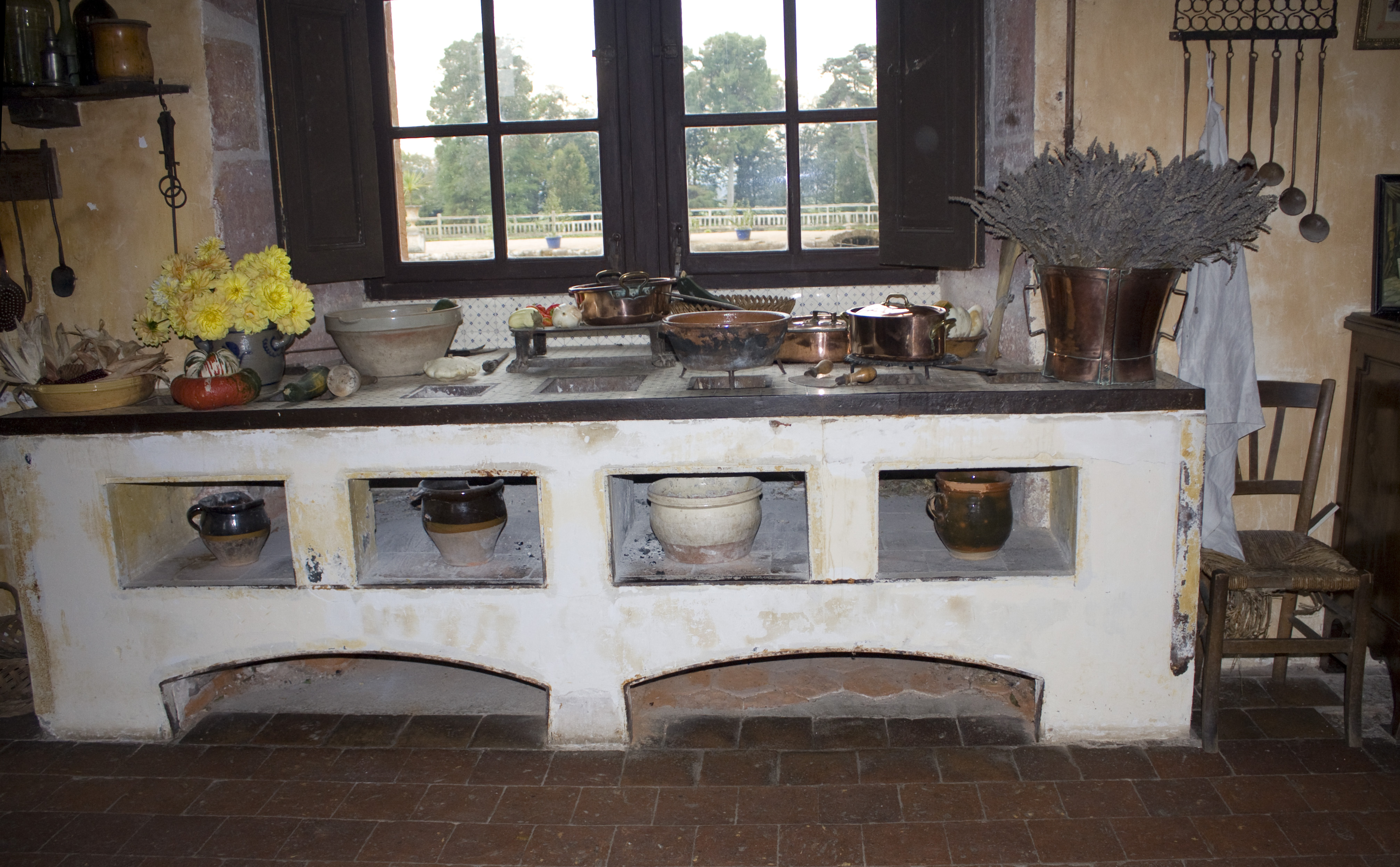 Le potager.